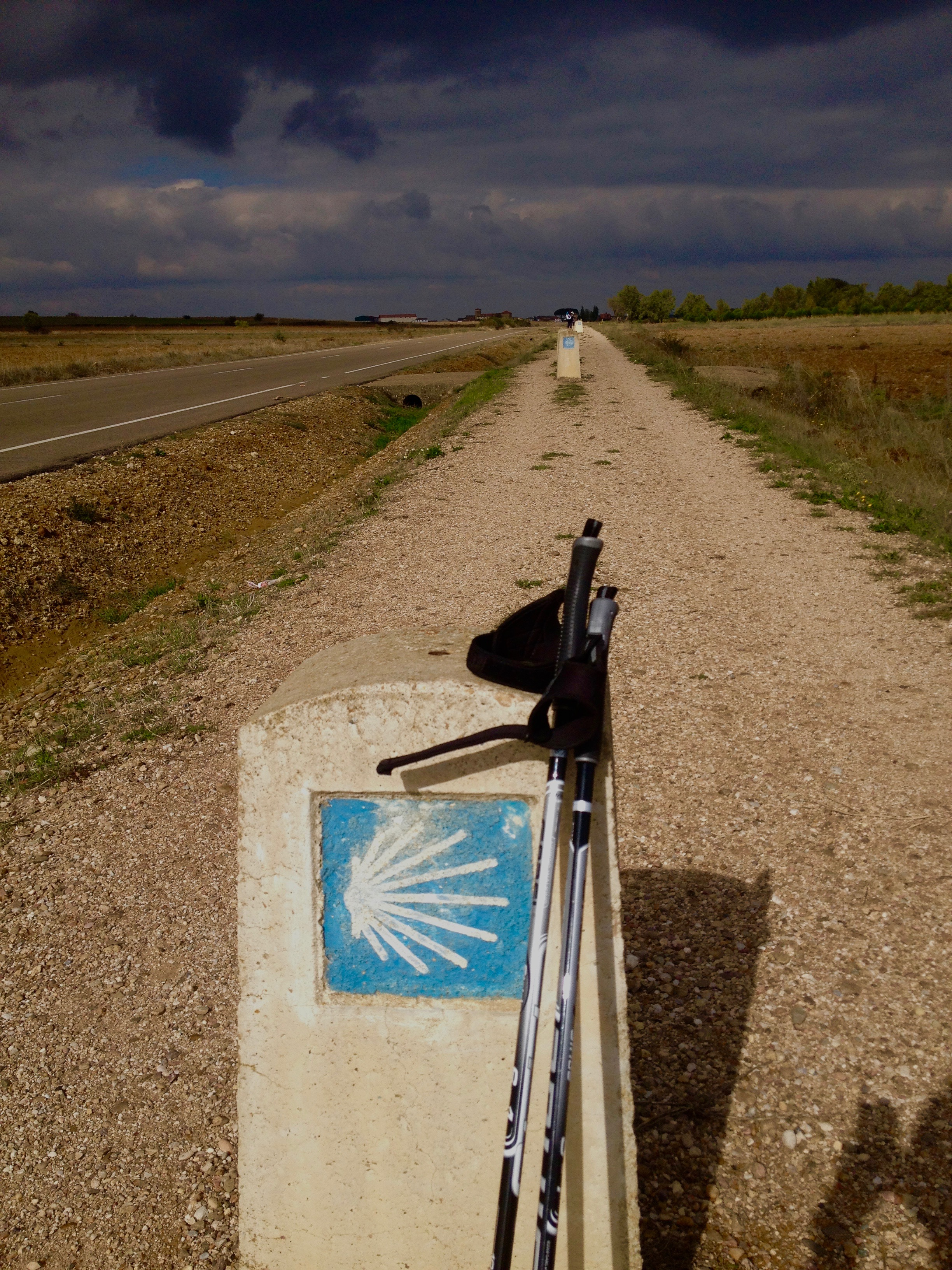 Caminostrada near Villovieco, Kastylia-León, Hiszpania